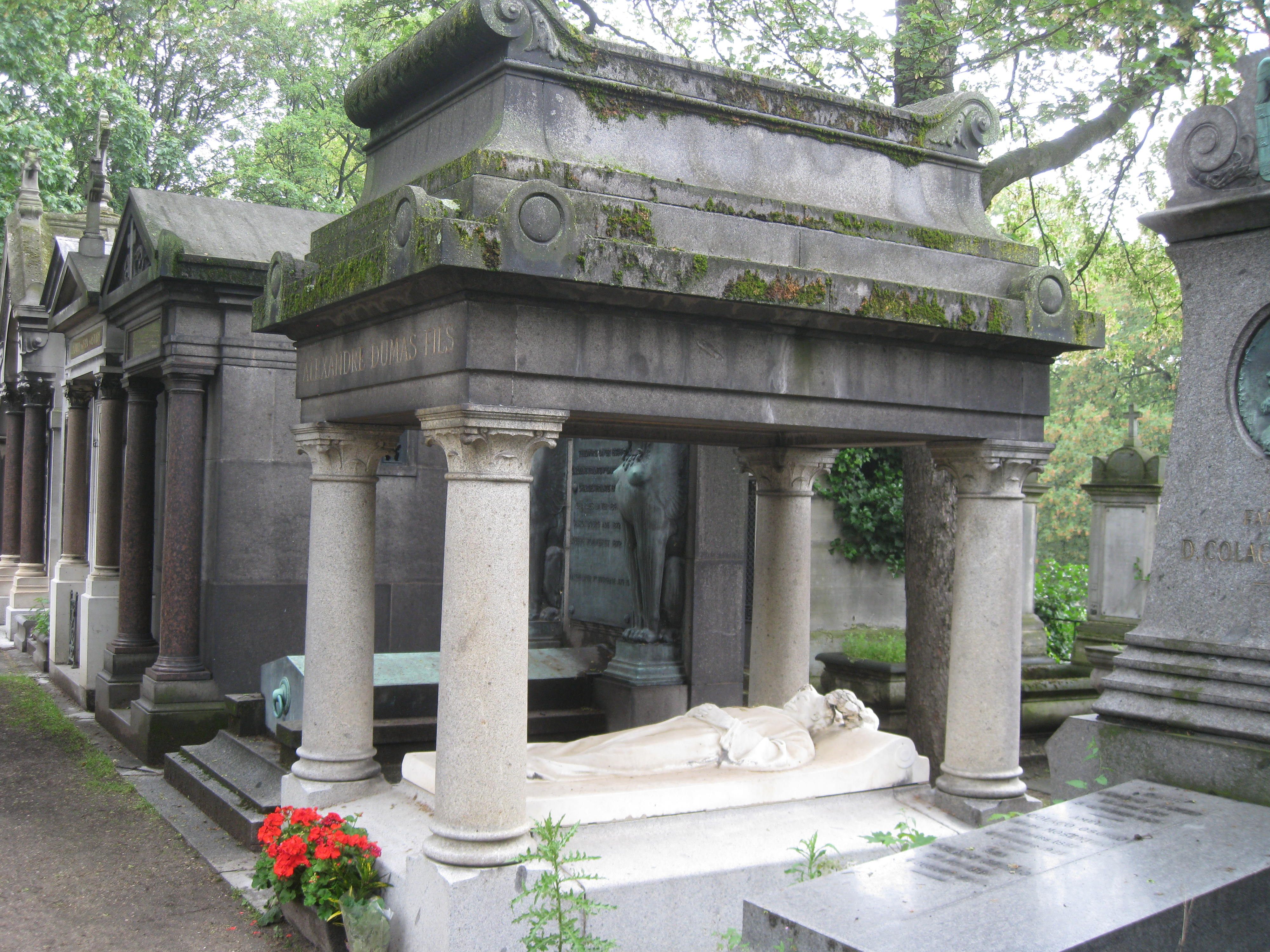 アレキサンドル・デュマ（息子）の墓